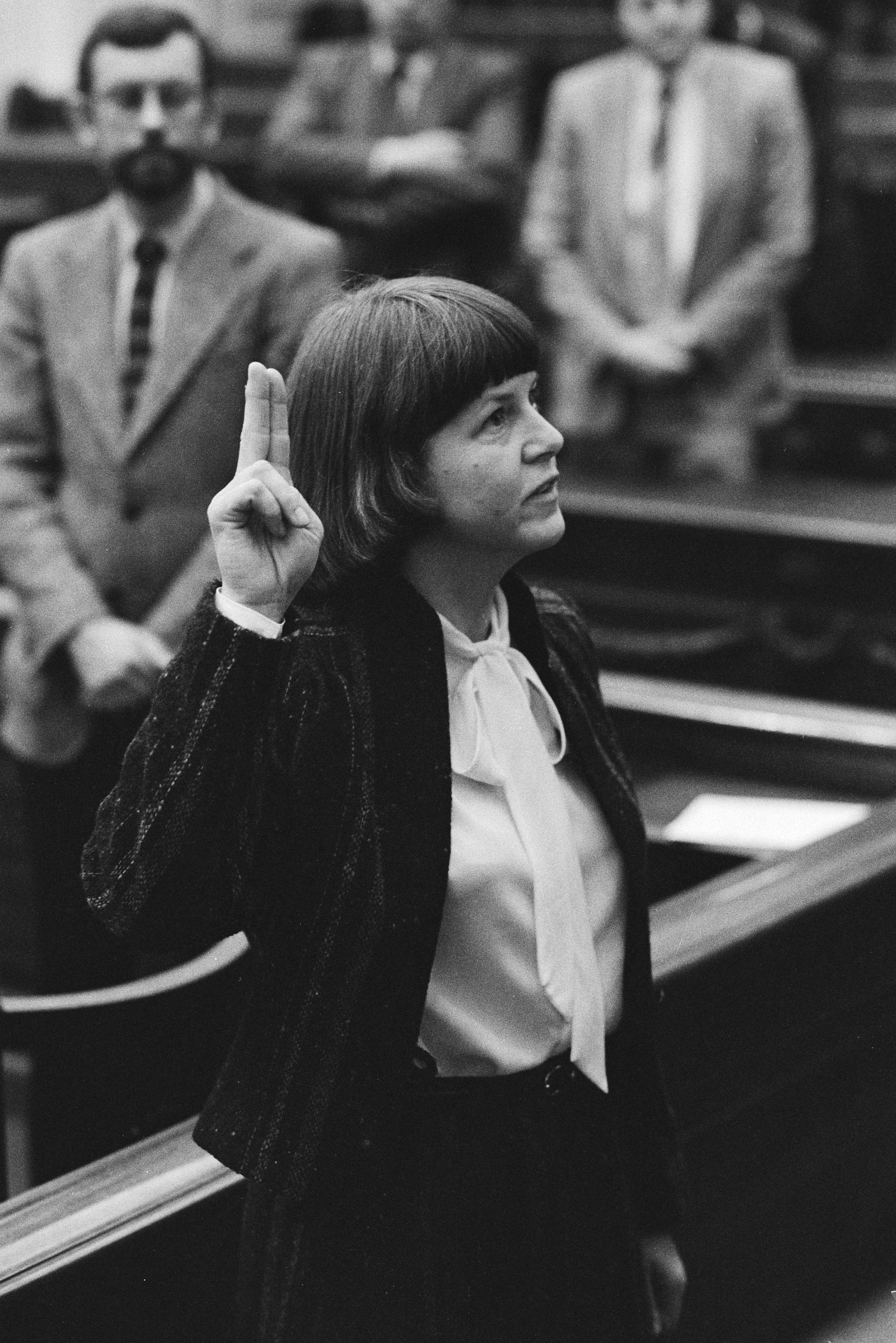 Collectie / Archief : Fotocollectie Anefo Reportage / Serie : Behandeling van de begroting 1983 van Sociale Zaken en Werkgelegenheid in de Tweede Kamer Beschrijving : Installatie van mevrouw drs. F.J. Laning-Boersema (CDA) Datum : 16 maart 1983 Locatie : Den Haag, Zuid-Holland Trefwoorden : ambtsaanvaardingen, overheidsbegrotingen, parlementariërs Persoonsnaam : Laning-Boersema, Frouwke Instellingsnaam : CDA, Tweede Kamer Fotograaf : Antonisse, Marcel / Anefo Auteursrechthebbende : Nationaal Archief Materiaalsoort : Negatief (zwart/wit) Nummer archiefinventaris : bekijk toegang 2.24.01.05 Bestanddeelnummer : 932-5336